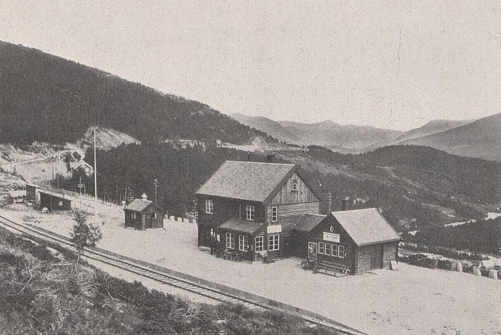 Bottheim stasjon. Fra Paul Alm: Raumabanen (Aarflot, 1924).